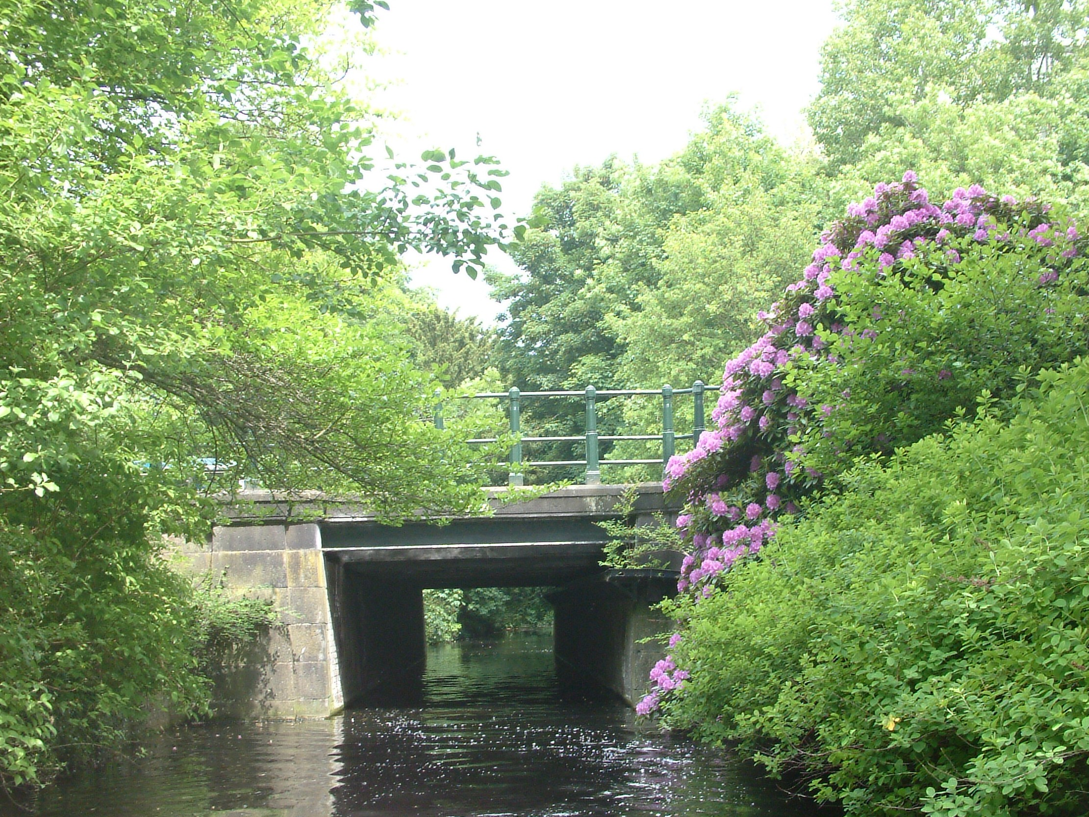 Bridges in The Hague as mentioned in the filename.